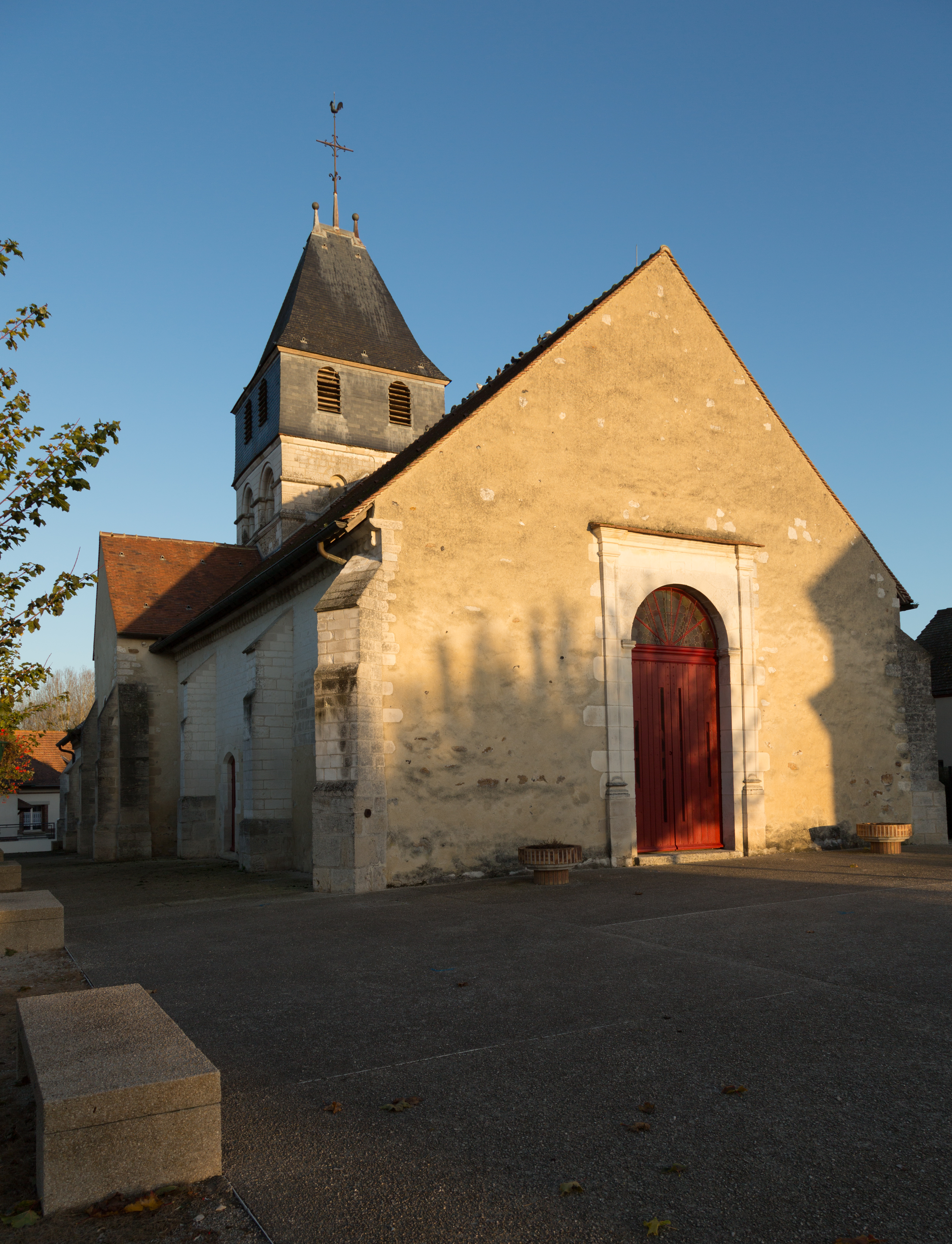 Église Saint-Martin